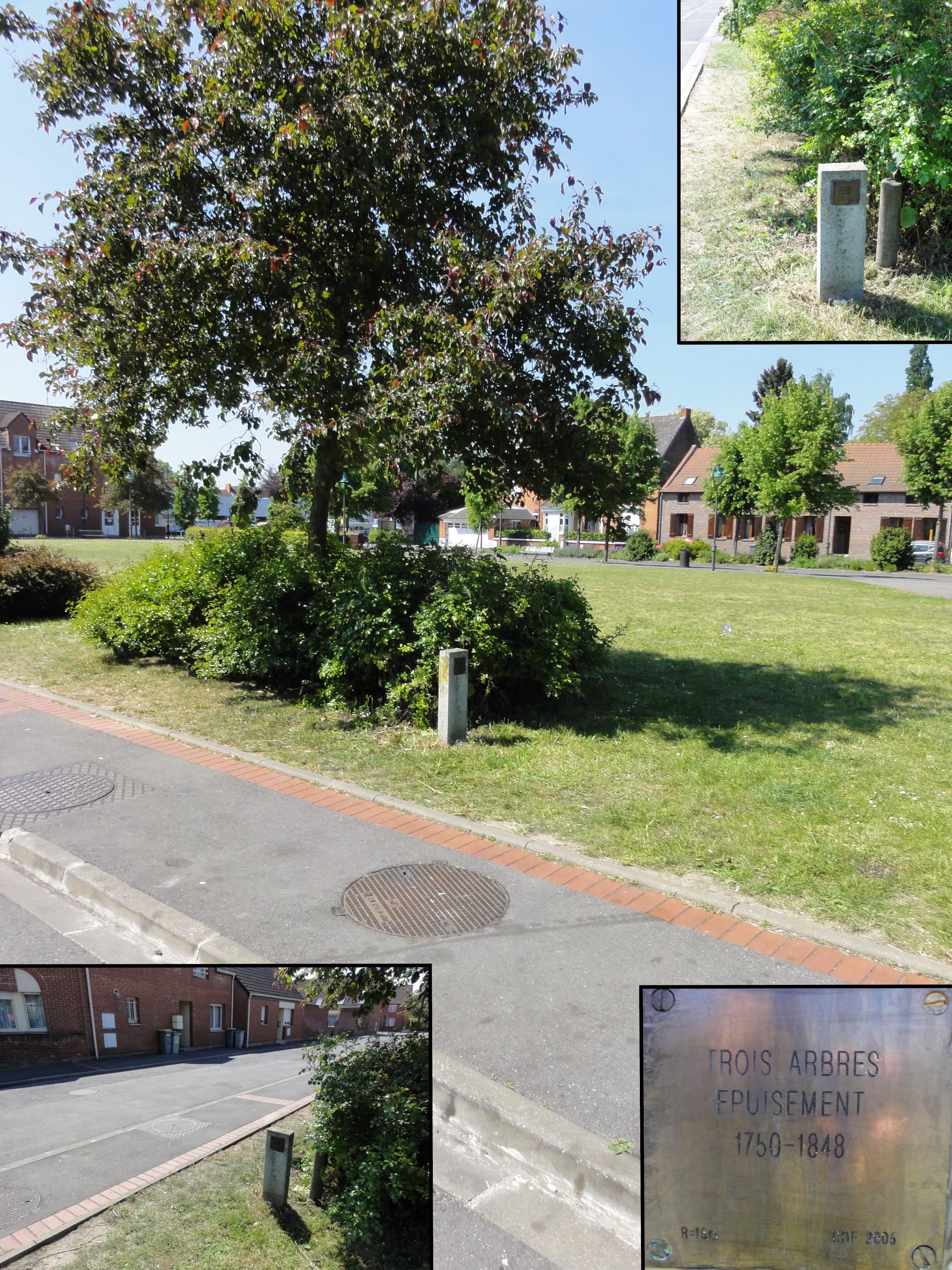 La Fosse Trois Arbres de la Compagnie des mines d'Anzin était un charbonnage constitué de deux puits situé à Vieux-Condé, Nord, Nord-Pas-de-Calais, France.